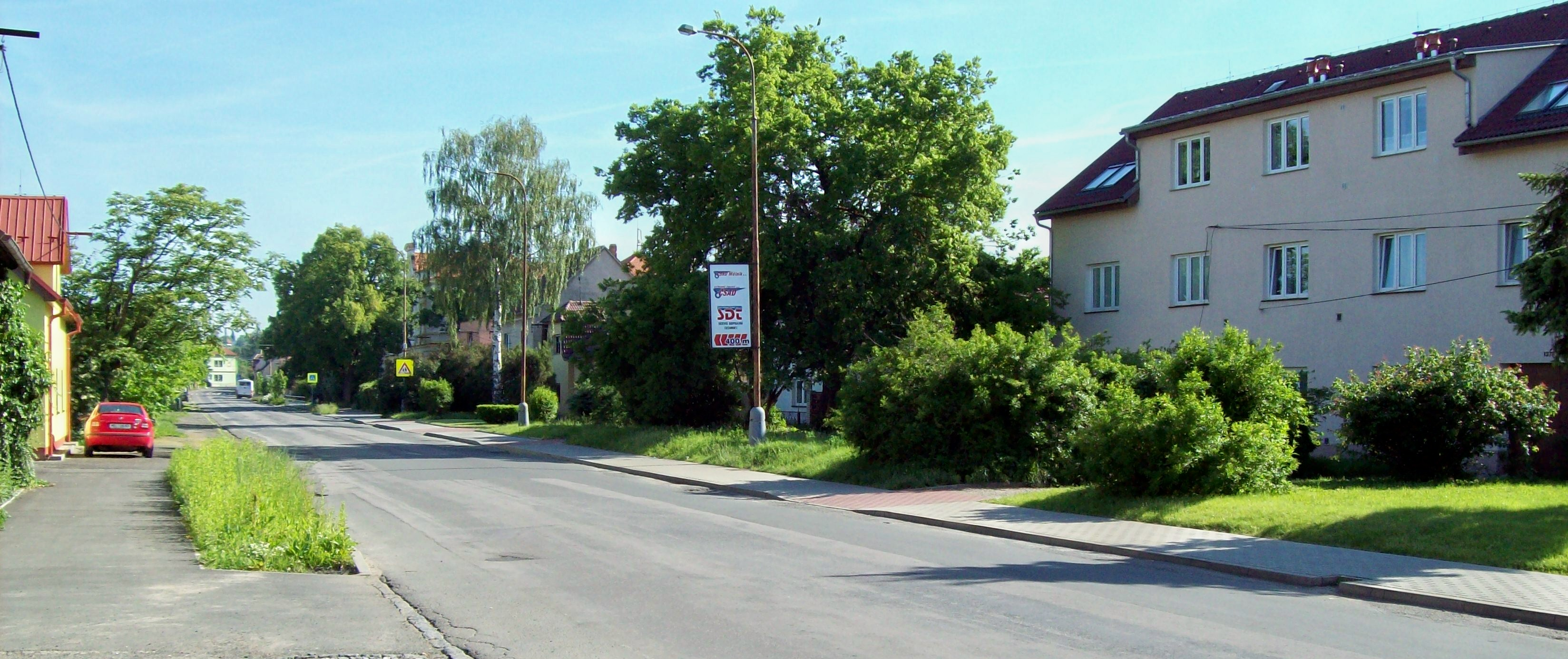 Českolipská ulice, Mlazice - Mělník.